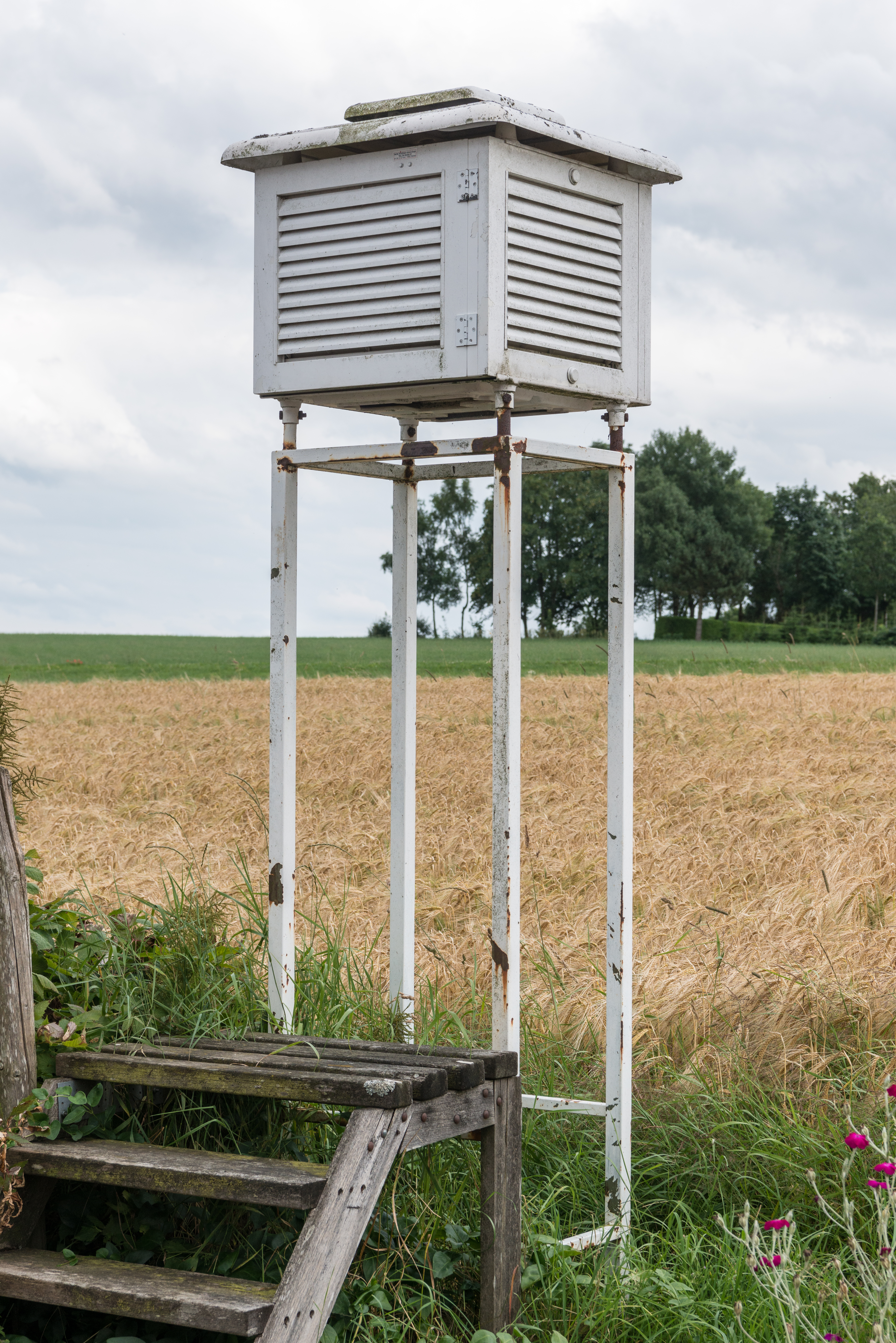 Déi al manuell Wiederstatioun zu Dol.